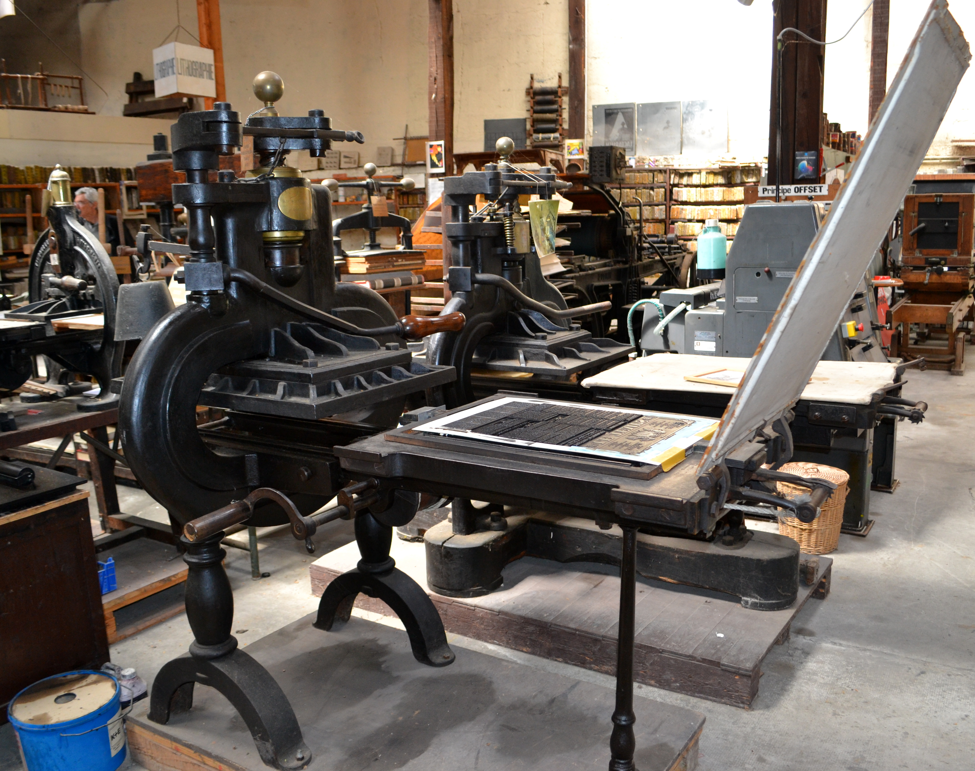 Musée de l'imprimerie de Bordeaux - presse type Stanhope